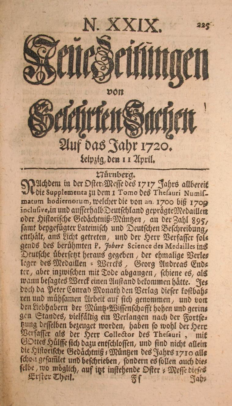 Neue Zeitungen von Gelehrten Sachen: Early German Newspaper, Title, 11 April 1720 / Neue Zeitungen von Gelehrten Sachen: Frühe deutsche Zeitung, Titelseite, 11. April 1720